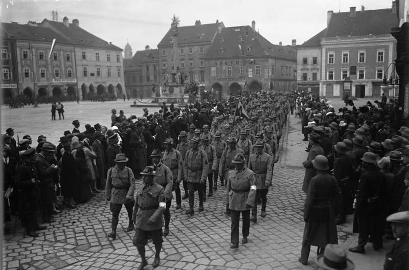 Aufmarsch der oesterr. Heimwehren in Wiener Neustadt